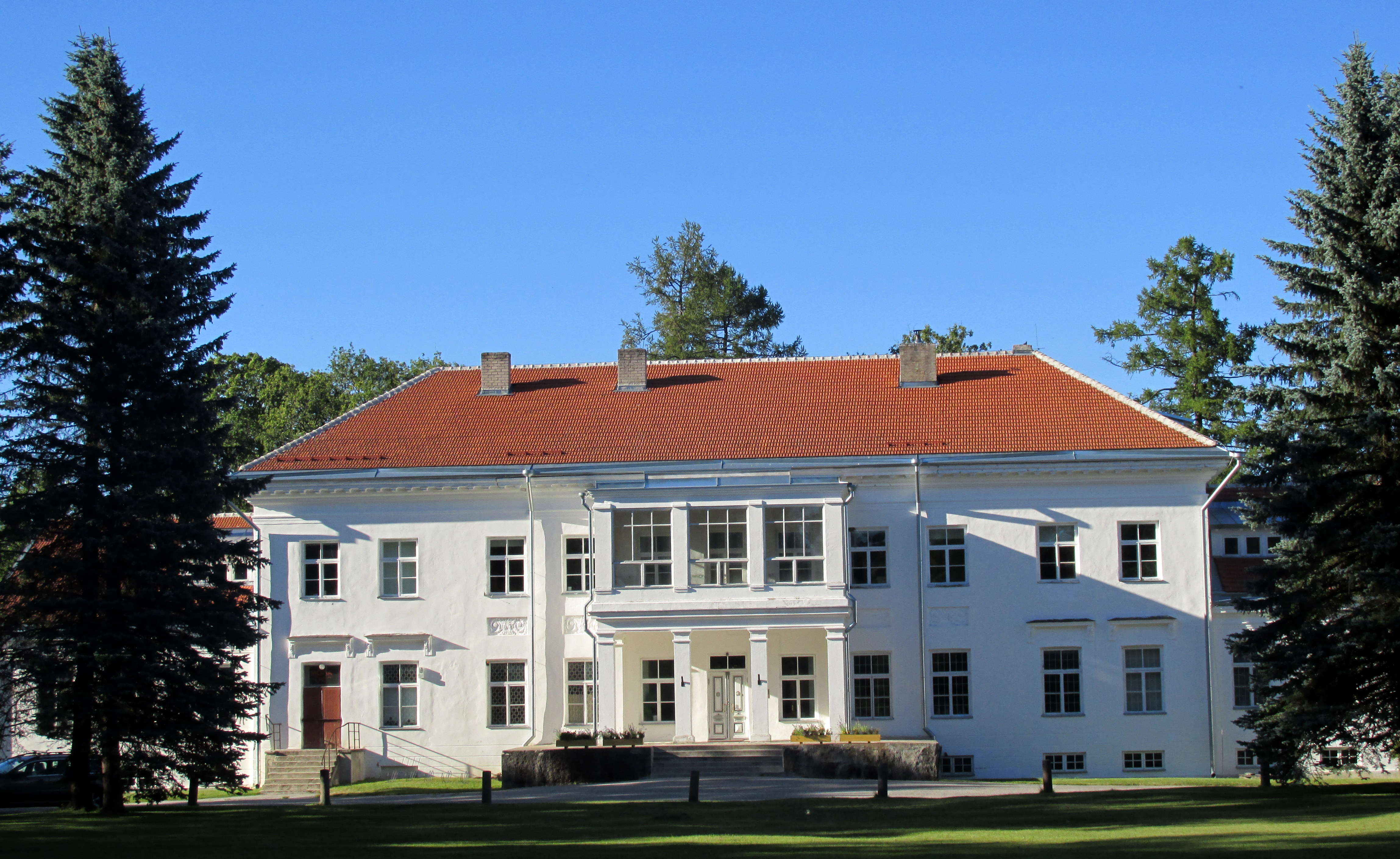 Kohila mõisa peahoone